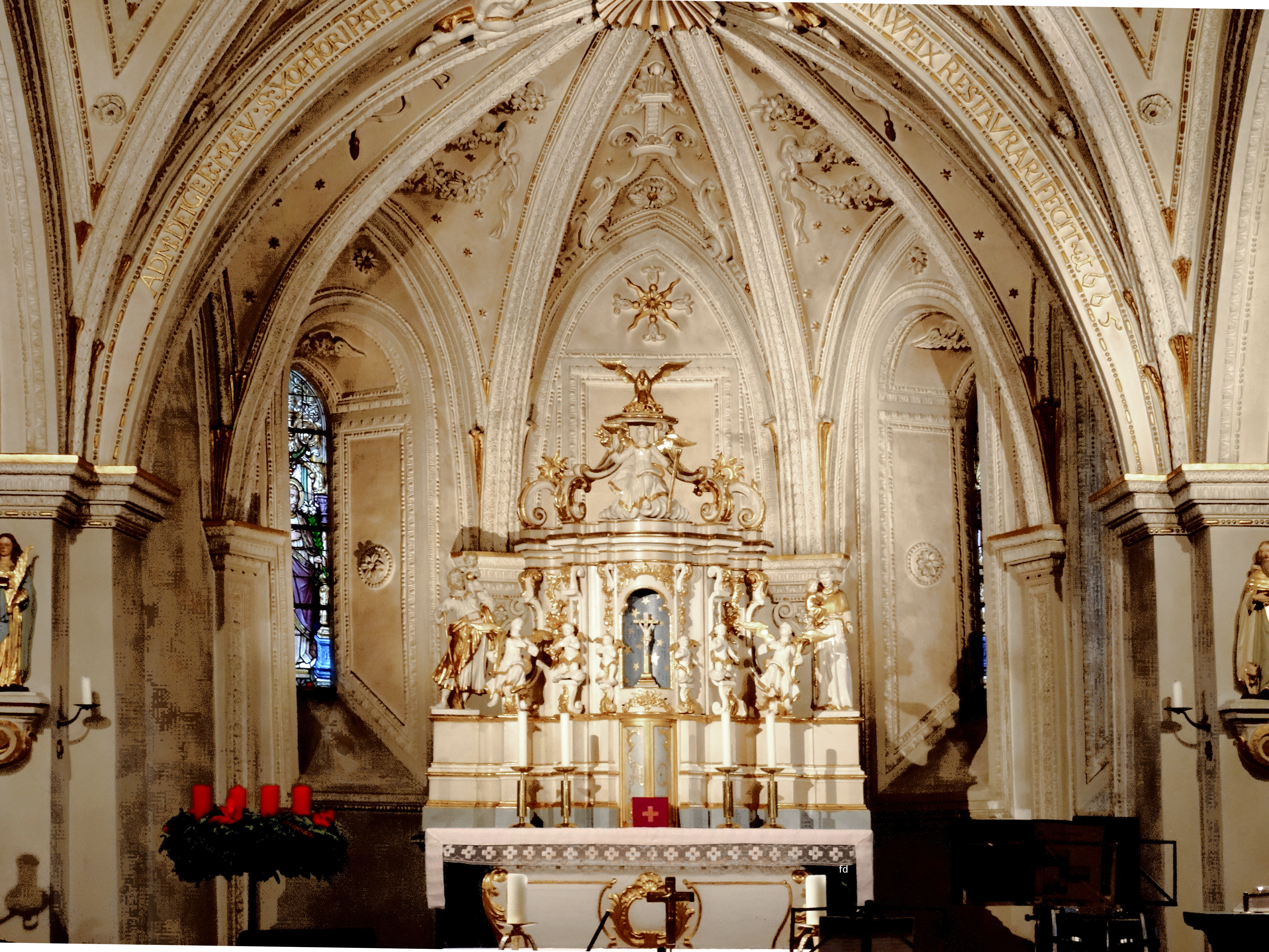 St. Christophorus (Hirschberg)Hochaltar